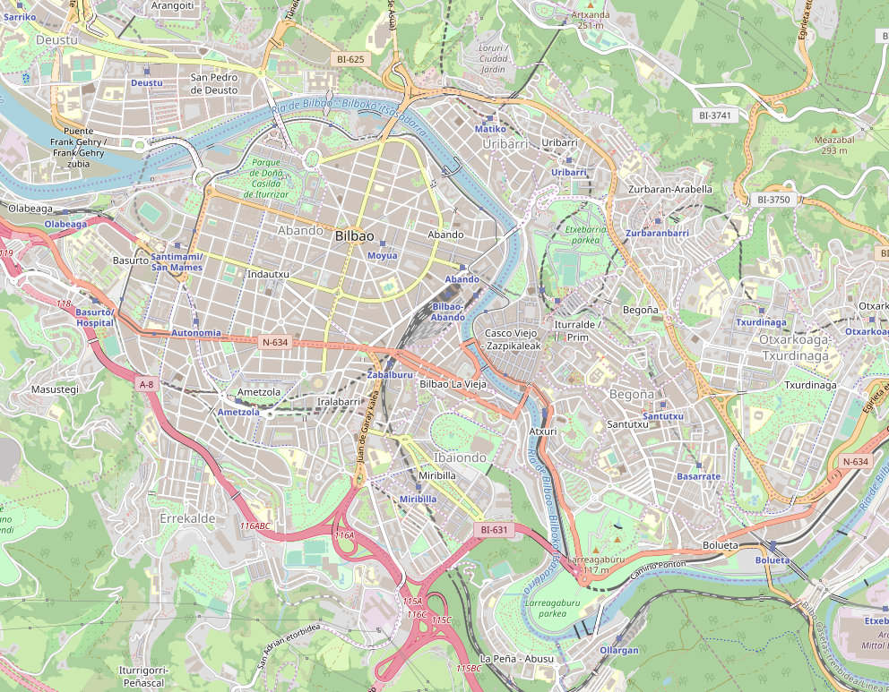 Bilbo hiriko erdigunearen kokapen mapa. Bizkaia, Euskal Herria - Location map of Bilbao city's center. Bizkaia, Basque Country.